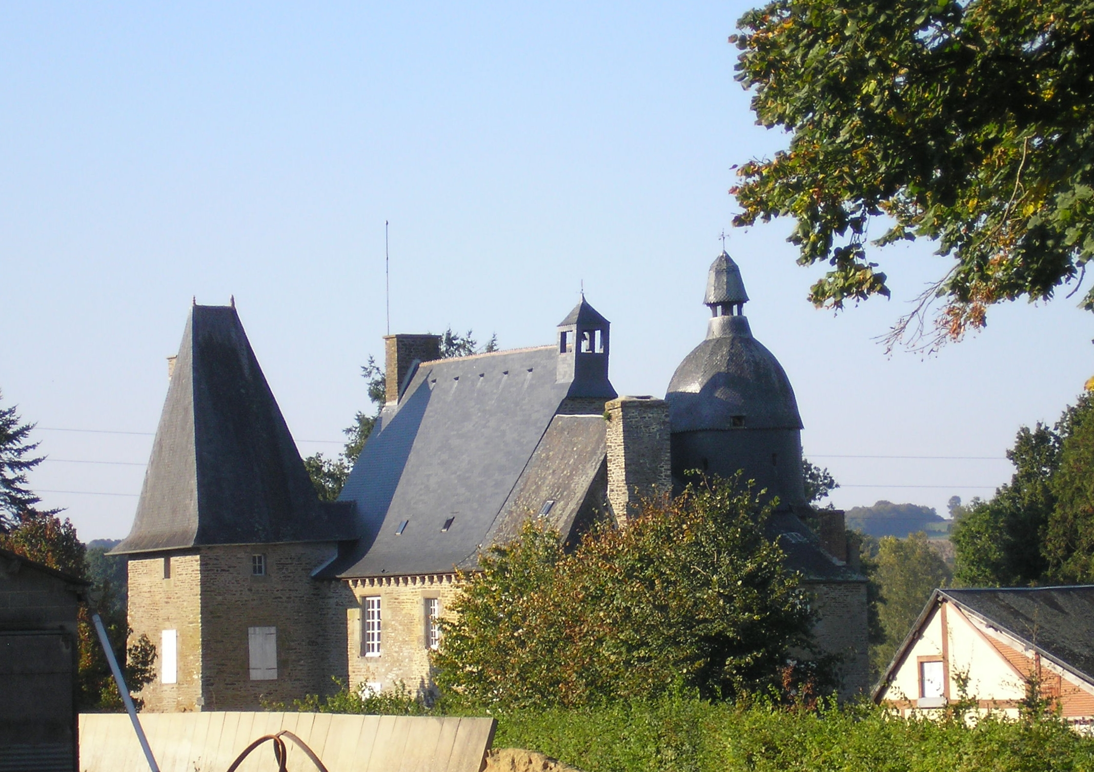 Le Mesnillard (Normandie, France). Le château de la Faucherie (Classé). .